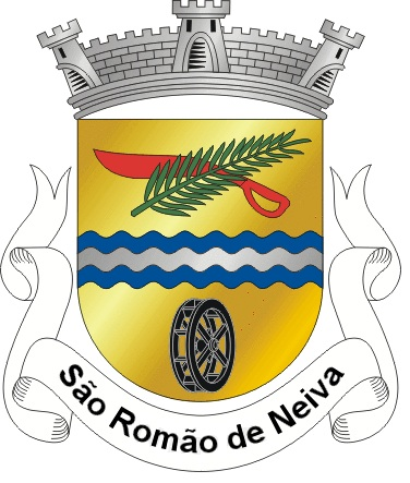 São Romão de Neiva Brasão